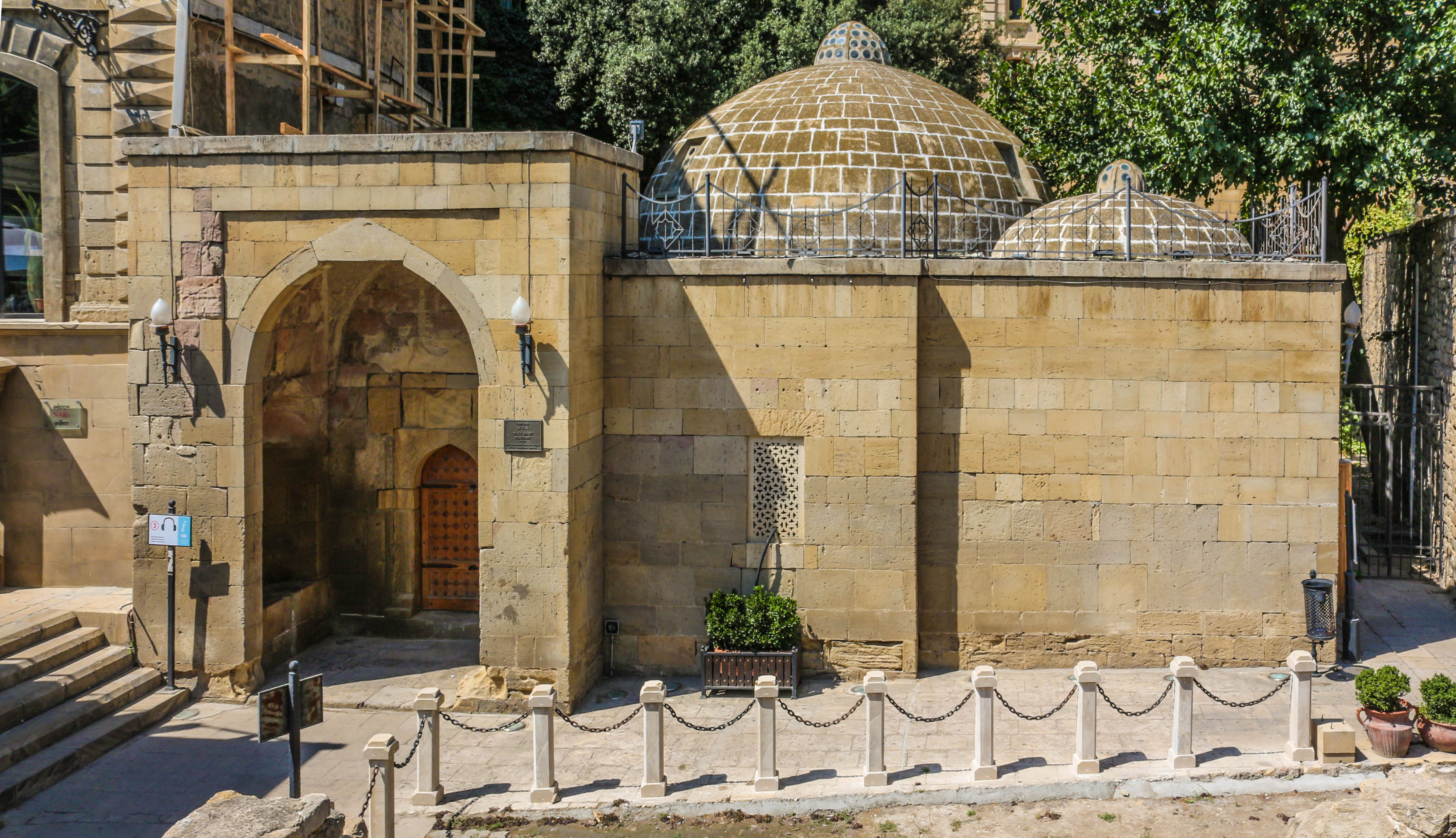 Hacı Bani hamamı